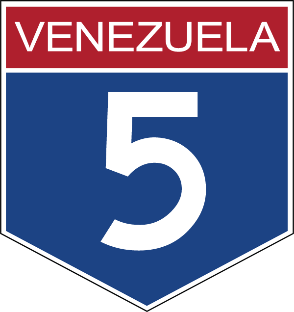 Venezuela: Disco de Identificación Troncal 5